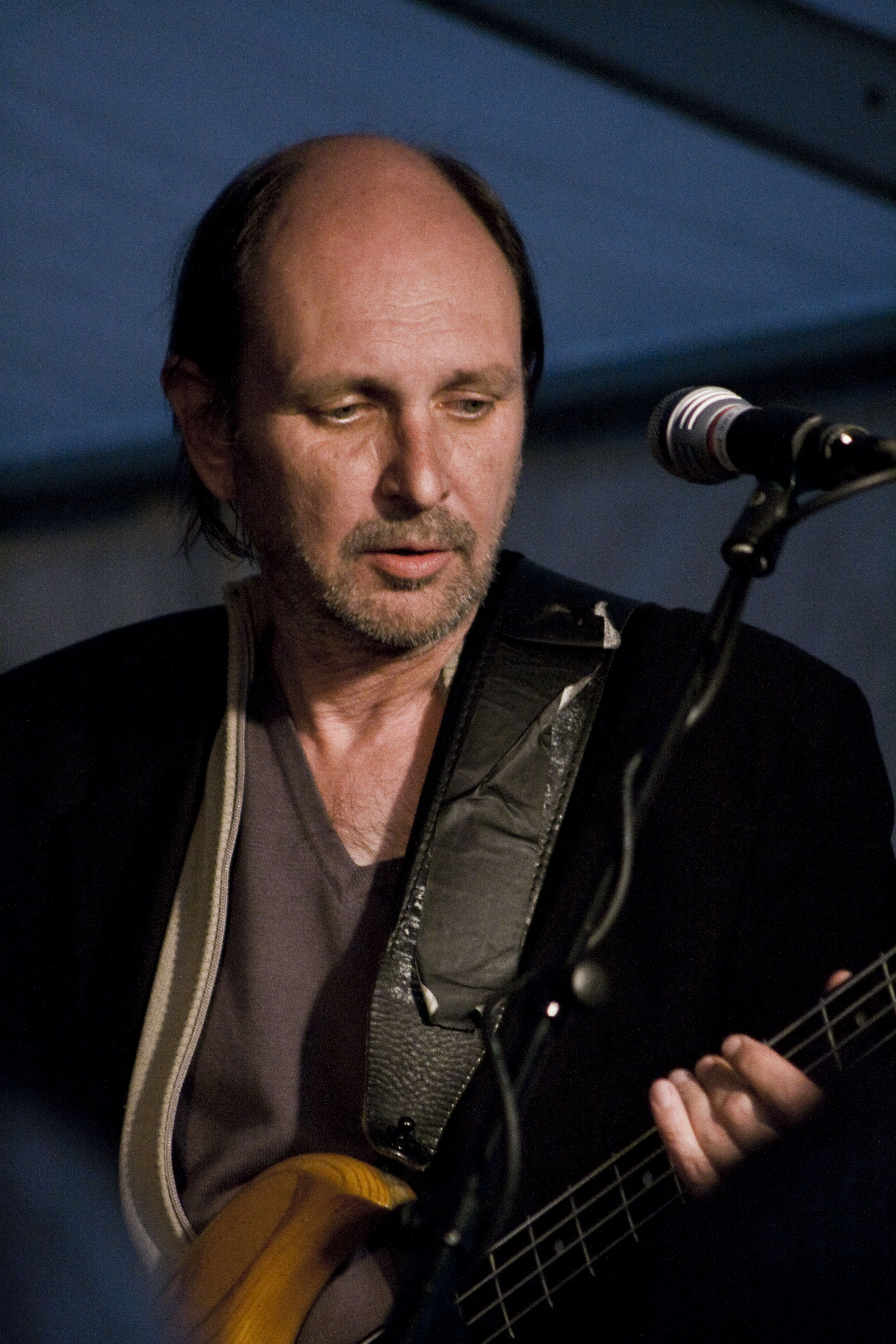 Tony Thorén under en konsert med Eldkvarn. Trollhättan 2008